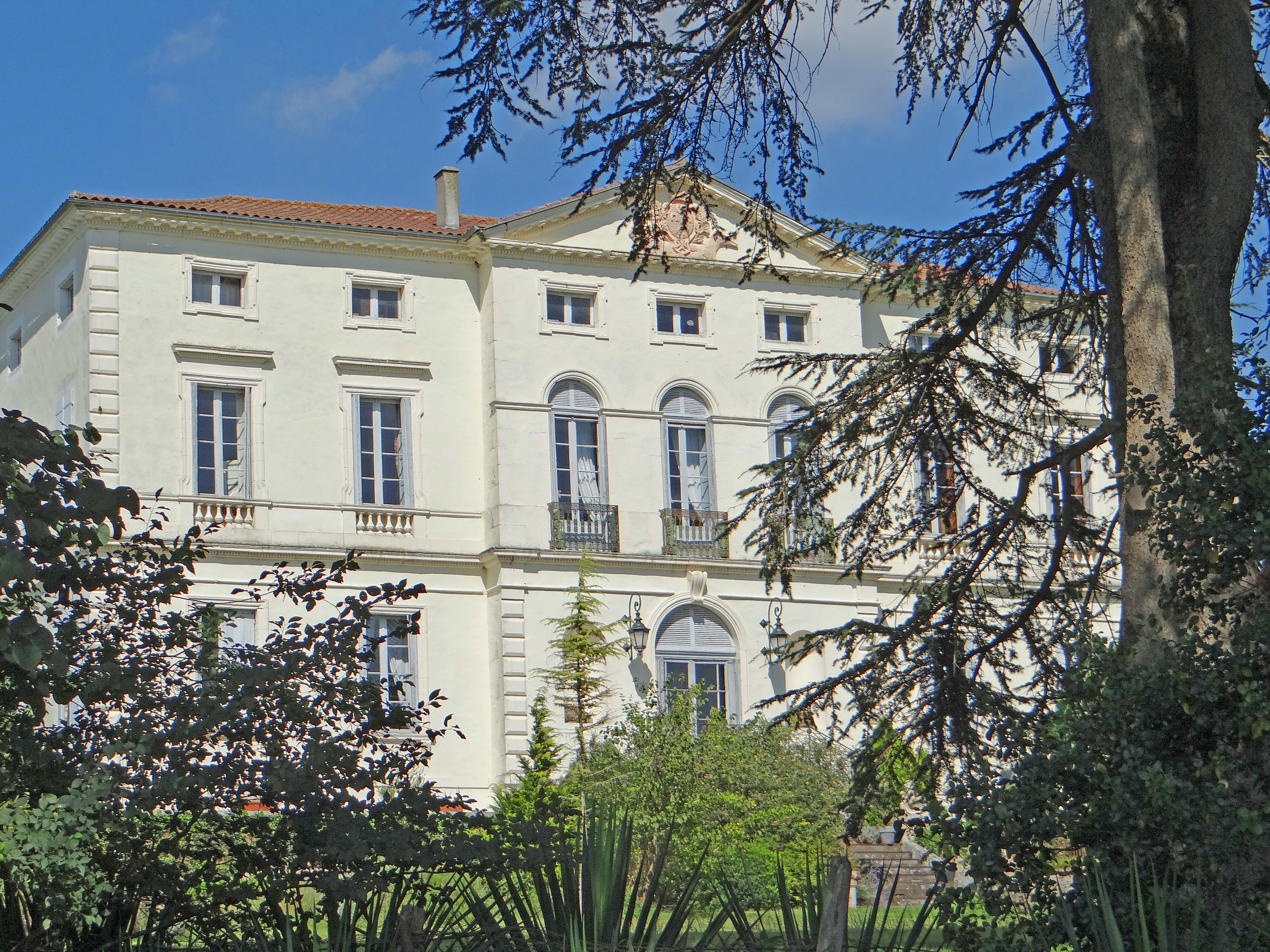 La Sauvetat-sur-Lède - Château Saint-Sulpice - Aile construite au début du XIXe siècle .